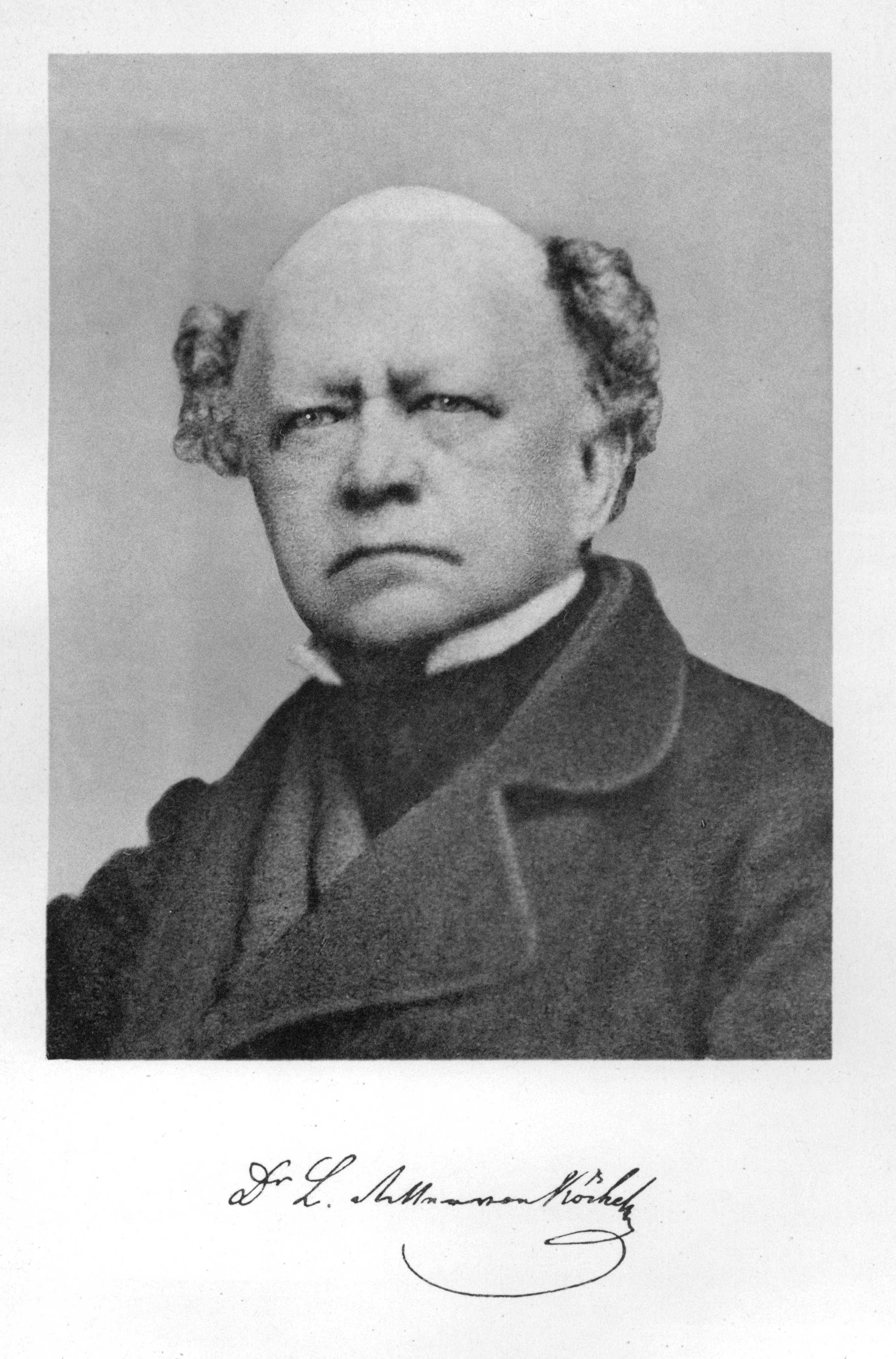 Photographie, die Ludwig Alois Friedrich Ritter von Köchel (1800-1877) zeigt.